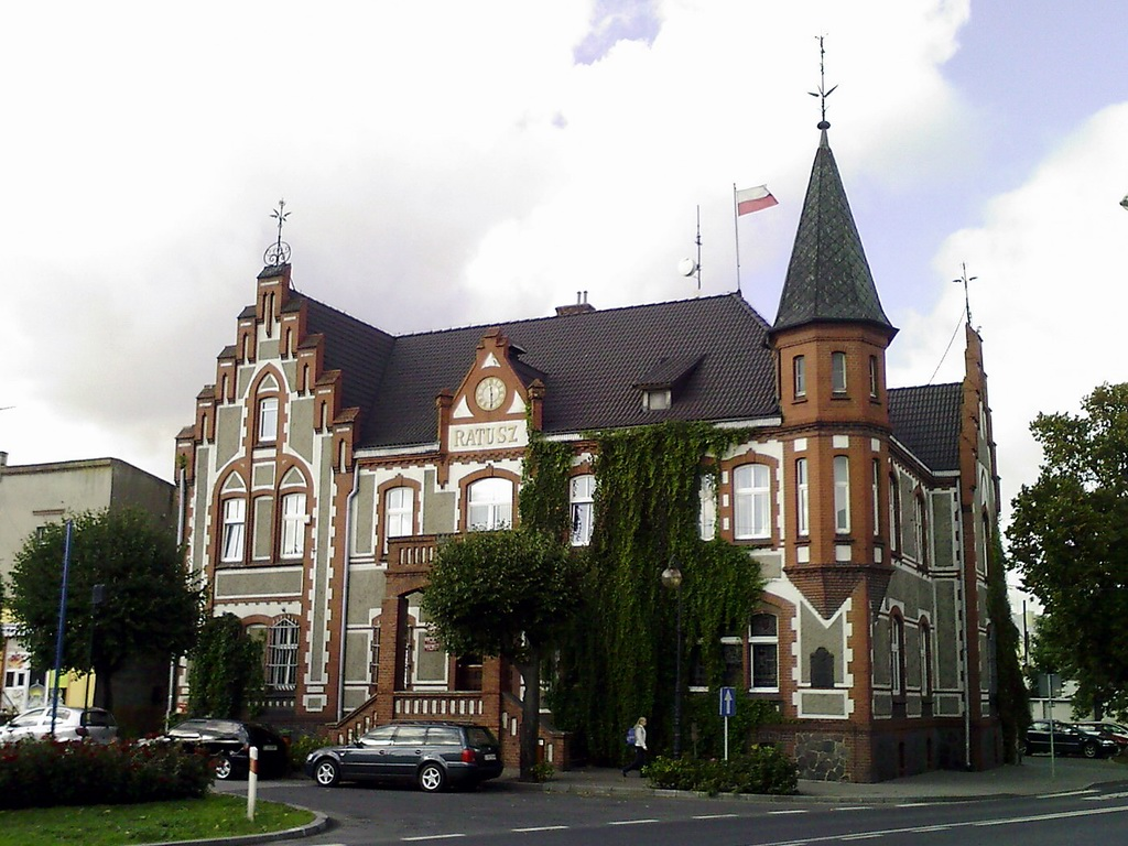 Pakość - ratusz miejski